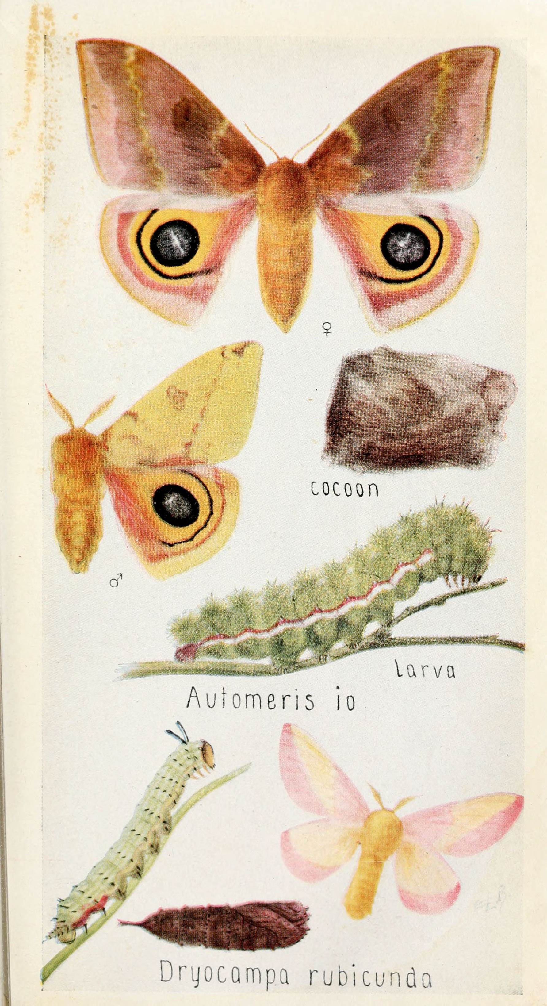 Auiomeris io Dryocampa rubicunda